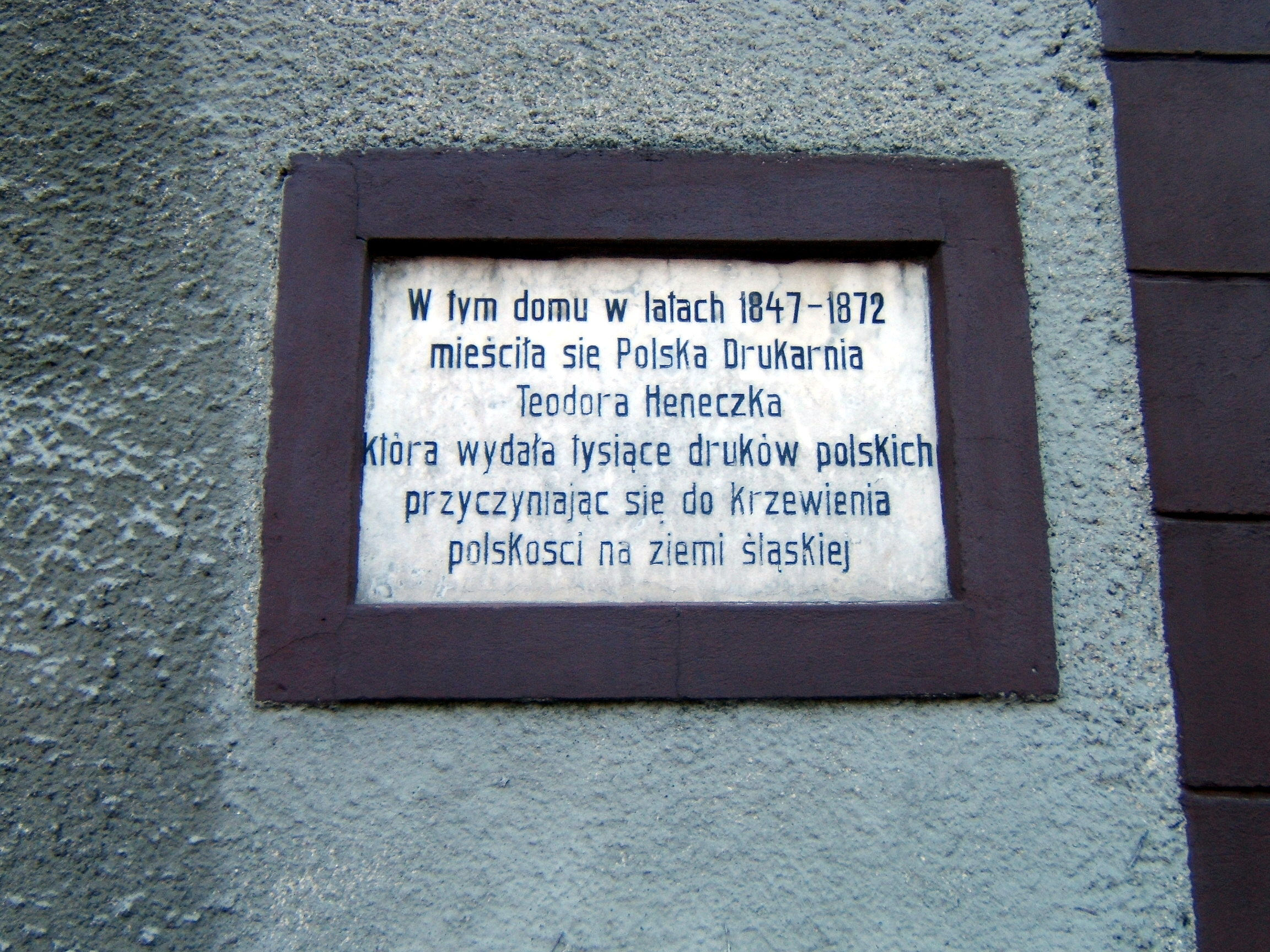 Tablica pamiątkowa na budynku, w którym mieściła się drukarnia Teodora Heneczka, Piekary Śląskie, Polska.